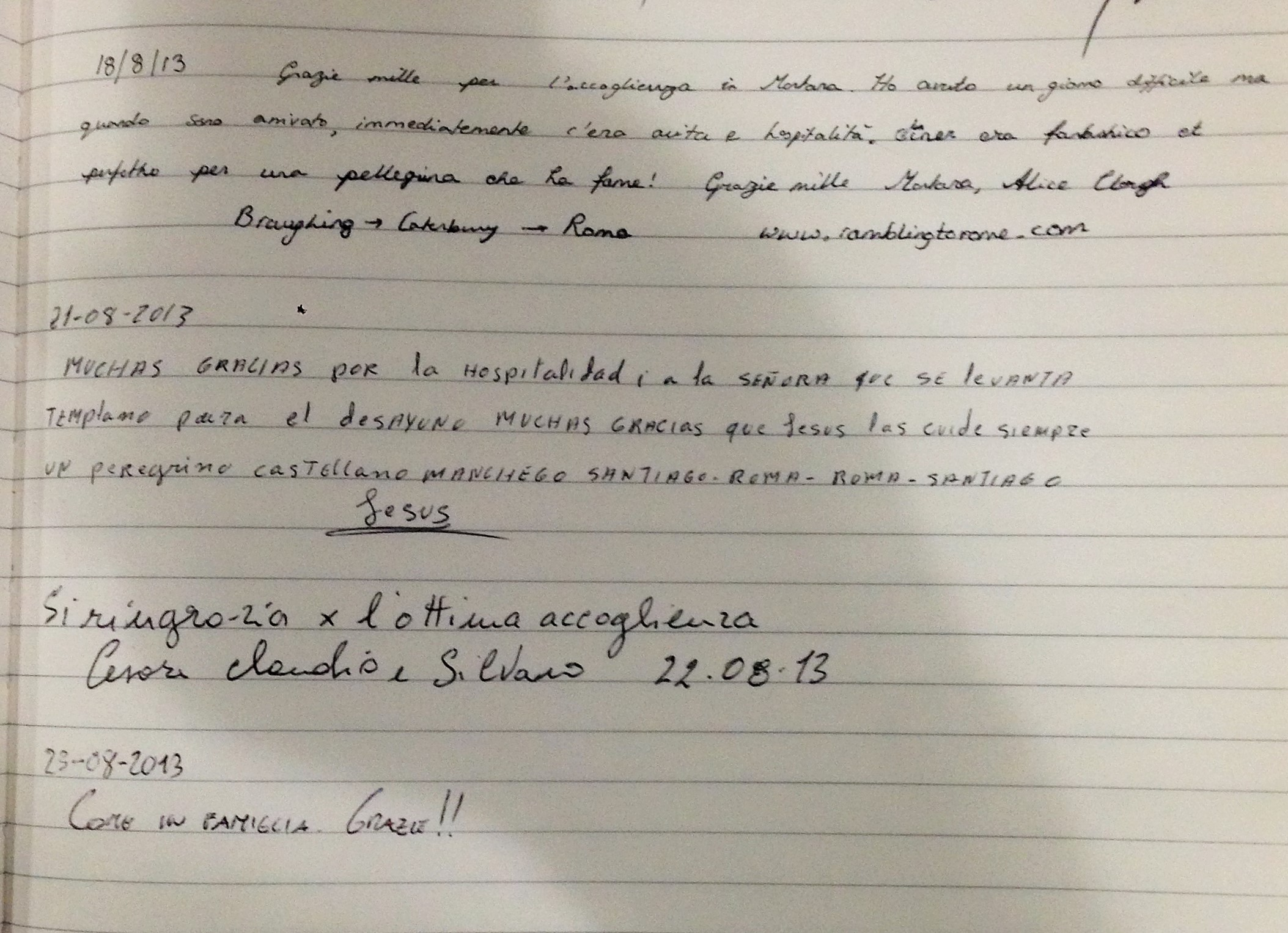 Testimonio de peregrinos en la Abadía de San Albino (Mortara)